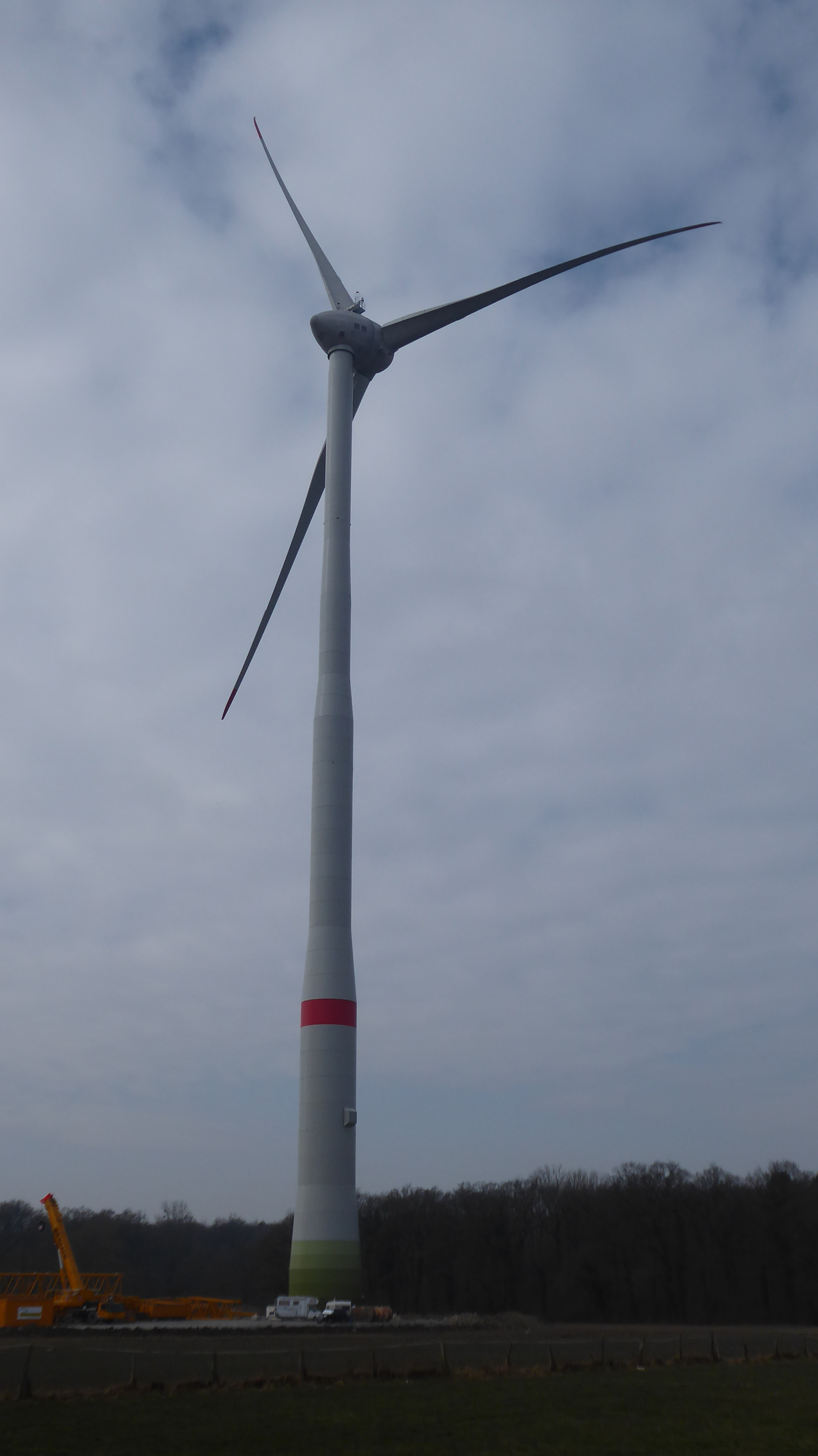 Enercon E-141 EP 4 Windenergieanlage mit 159 m Nabenhöhe Baujahr 2018 in Scharmede